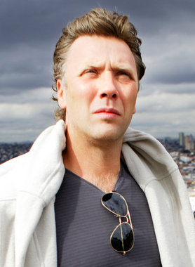 Inför TV-galan 2006 besökte Mikael Persbrandt och Zlatan Ibrahimovic UNICEF-projekt i Brasilien. Copyright/Foto: Melker Dahlstrand/UNICEF.